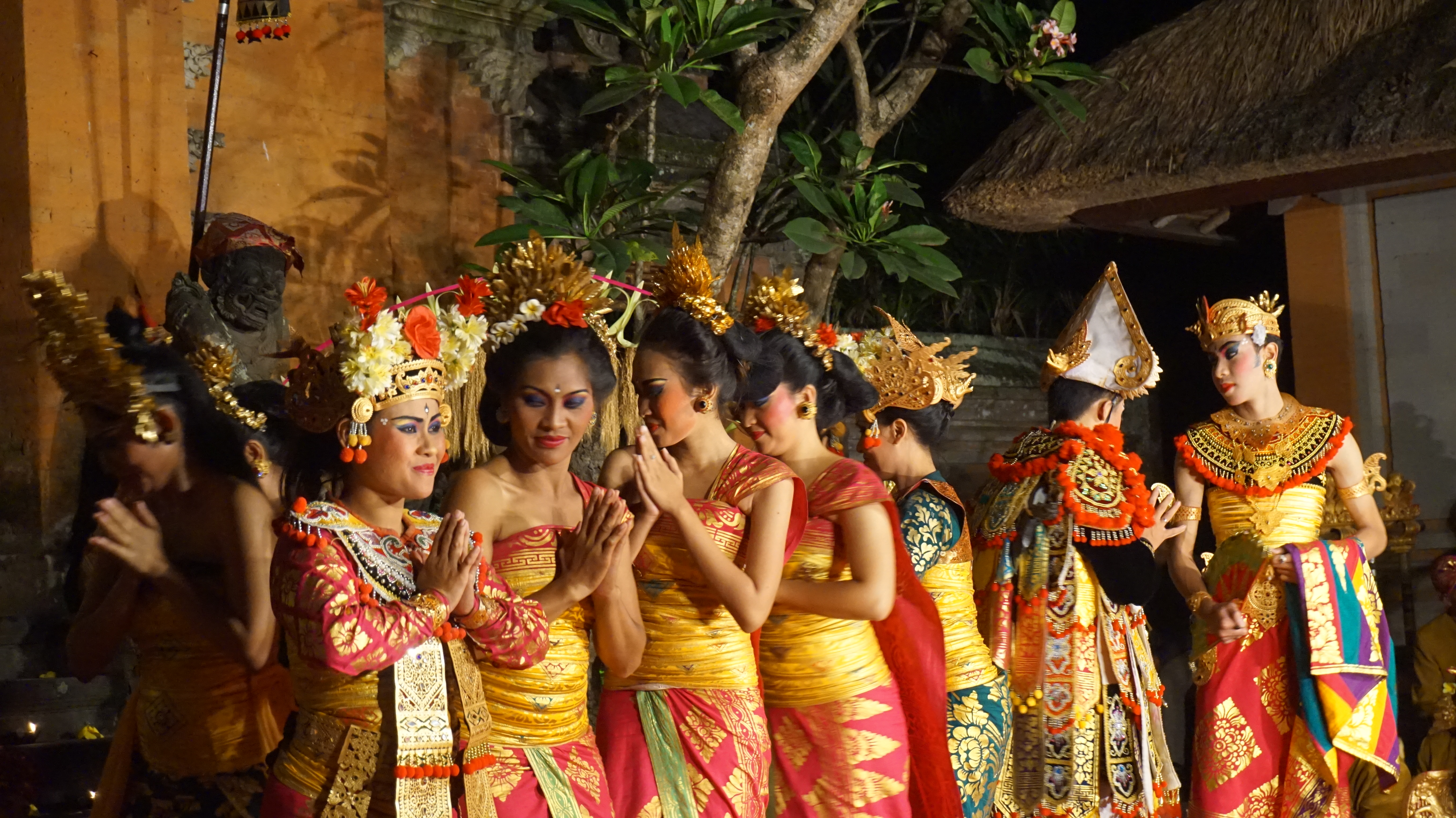 Danseuses indonésiennes à Bali.